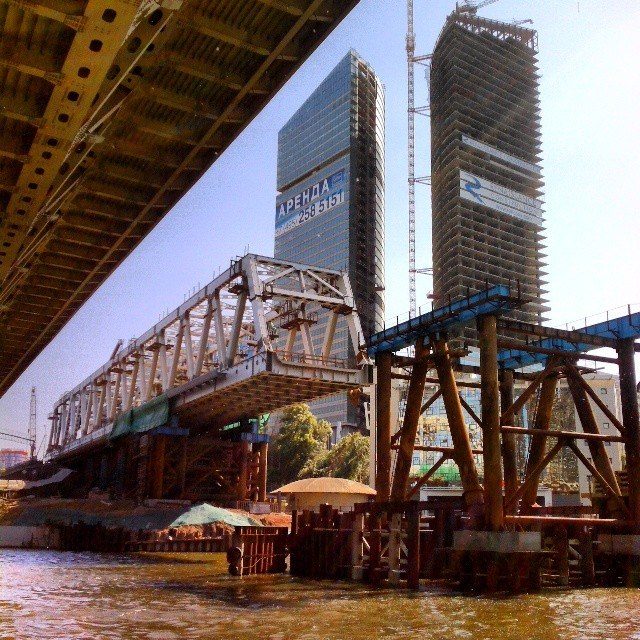 Строительство ЖД моста через Москву-реку МК МЖД перегон Кутузово - Пресня